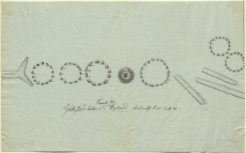 RAÄ-nr: Grimeton 3:1. Gravfält med bl a stenkretsar och treuddar. Tuschteckning troligen från J G Liljegrens samling, 1800-talets början, efter original av kopparstick ur Hallandia antiqua et hodierna, av Jacob Richardson, från 1752-1753. Motiv: Grimeton 3:1 Kategori: Teckning, Gravfält RAÄ-nr: Grimeton 3:1. Gravfält med bl a stenkretsar och treuddar. Tuschteckning troligen från J G Liljegrens samling, 1800-talets början, efter original av kopparstick ur Hallandia antiqua et hodierna, av Jacob Richardson, från 1752-1753. Grimeton 3:1.